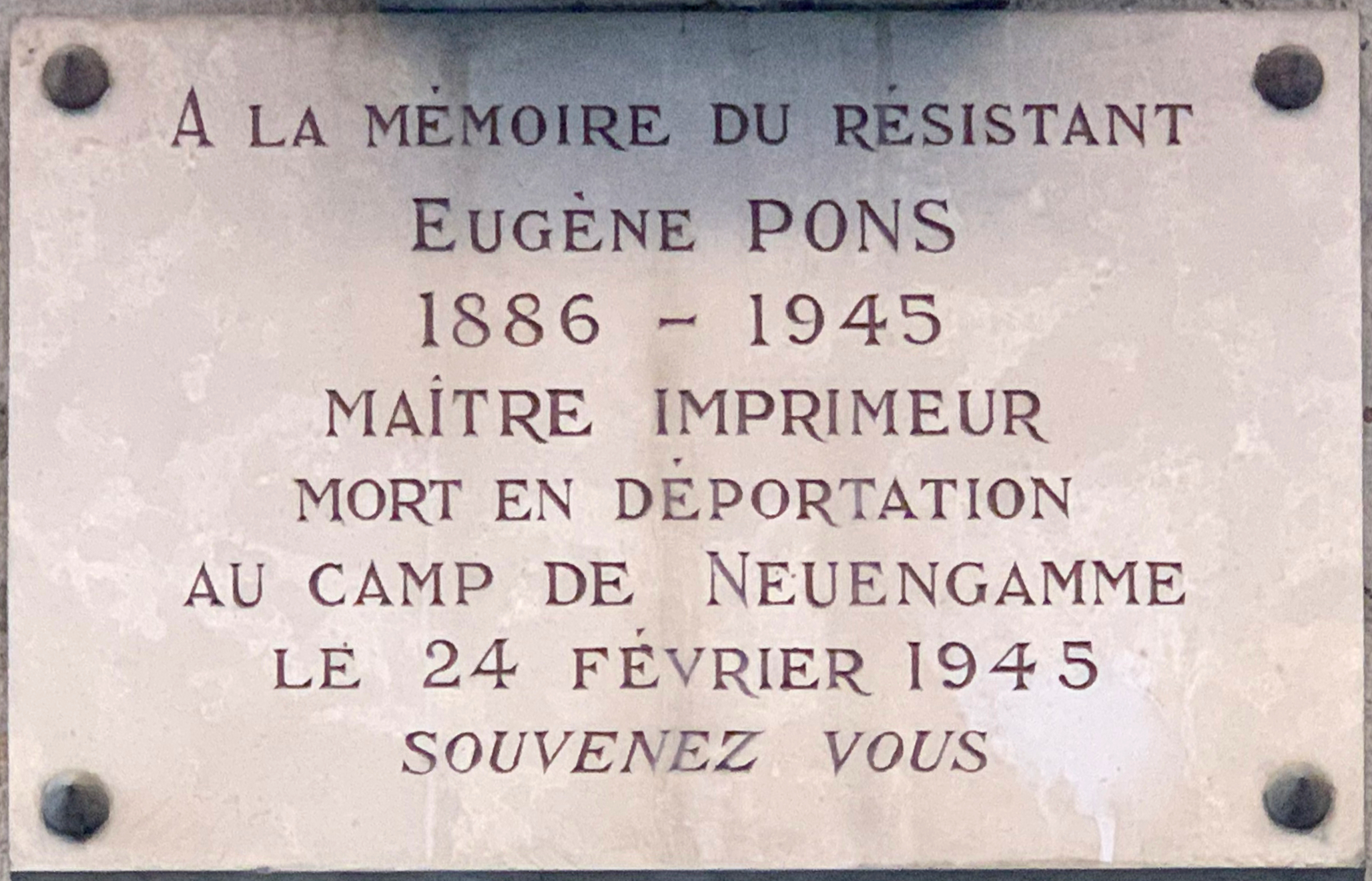 Plaque Eugène Pons, Rue René Leynaud (Lyon). recto in engraving: LA MÉMOIRE DU RÉSISTANT EUGÈNE PONS 1886 - 1945 MAÎTRE IMPRIMEUR MORT EN DÉPORTATION AU CAMP DE NEUENGAMME LE 24 FÉVRIER 1945 SOUVENEZ VOUS